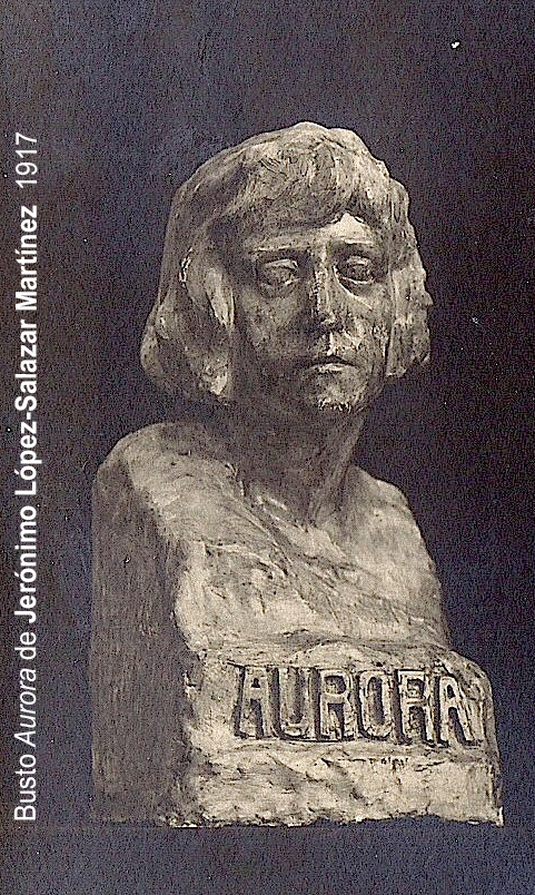 Aurora, escultura modernista de Jerónimo López-Salazar Martínez 1917